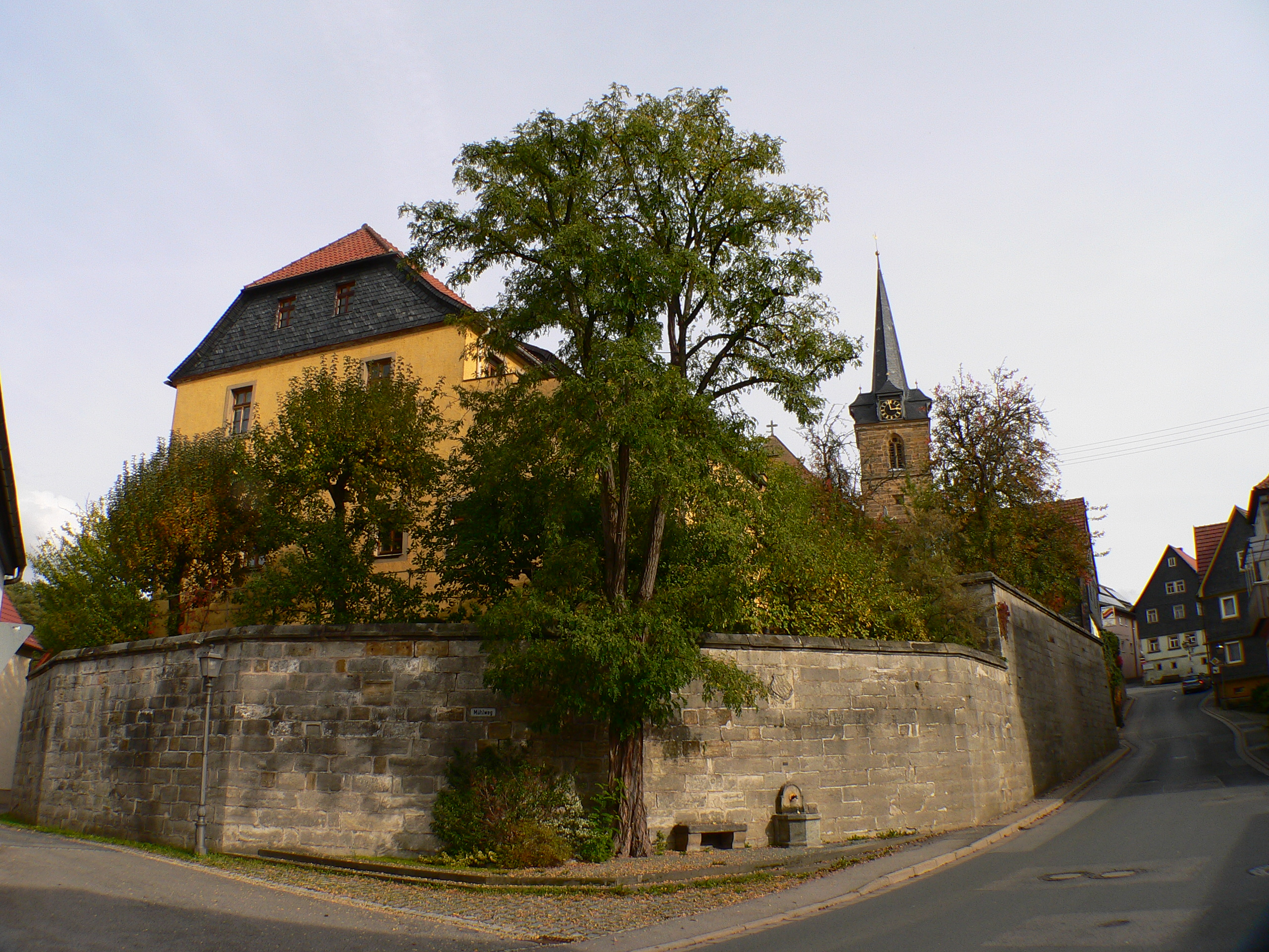 Mittleres Schloss in Küps, Bayern, Regierungsbezirk Oberfranken, Landkreis Kronach – Nordostseite